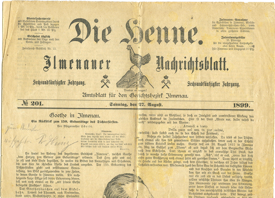 Titelseite der Ilmenauer Tageszeitung "Die Henne" vom 27. August 1899.